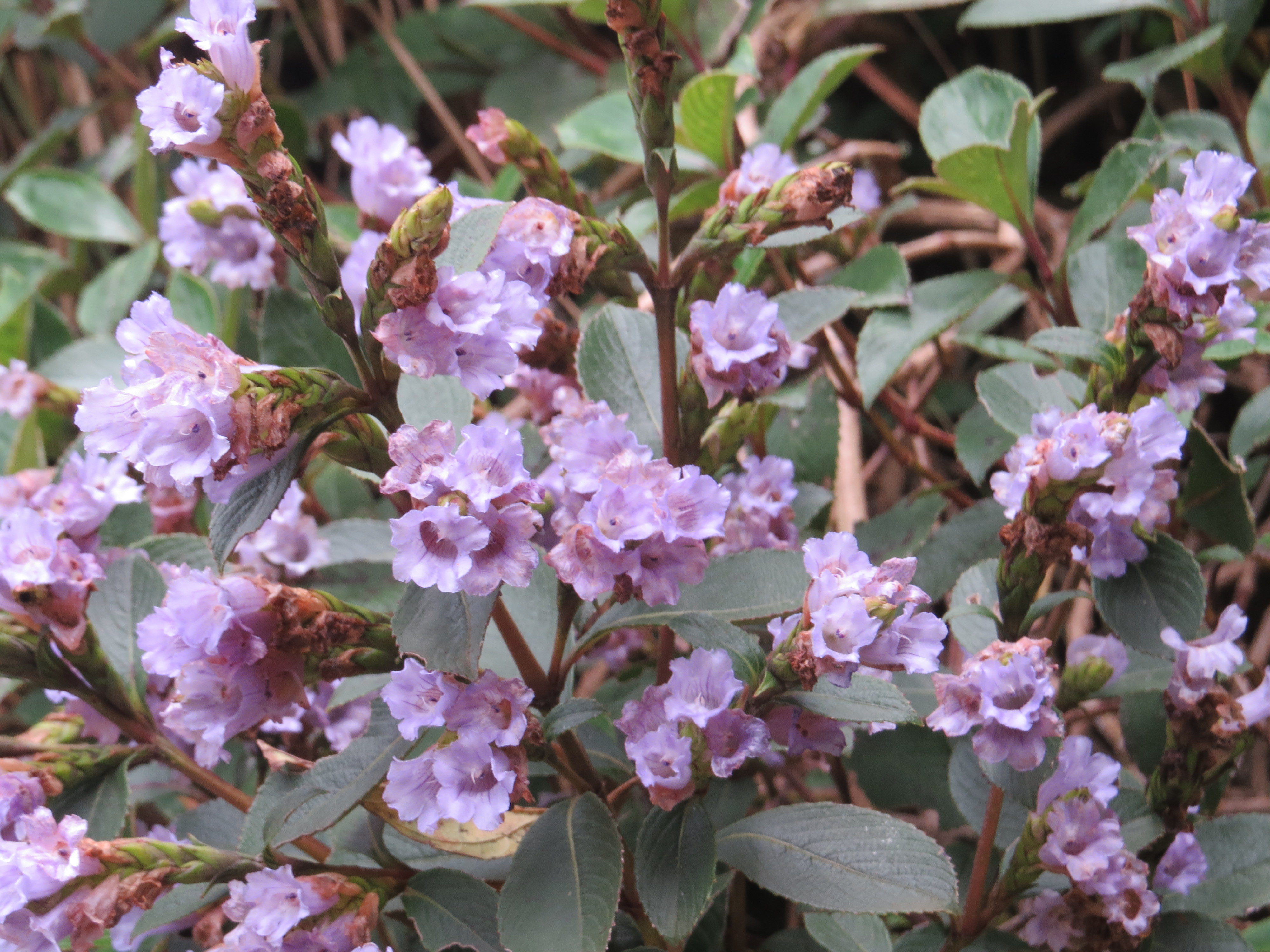 Photos taken at Mannavan Shola, Anamudi Shola National Park, Kerala during Munnar Butterfly Survey